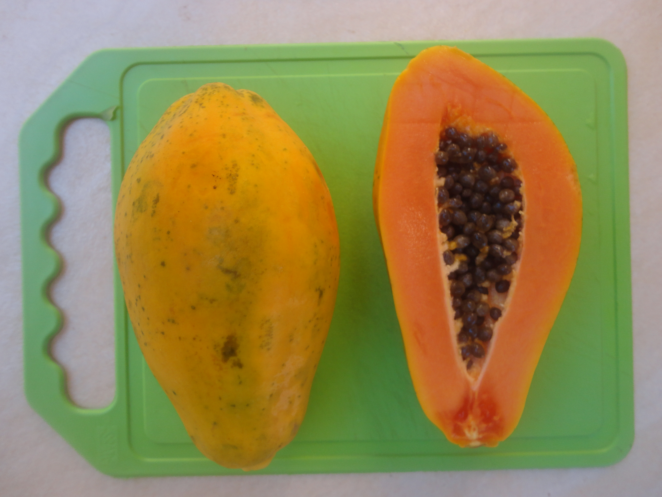 papaia